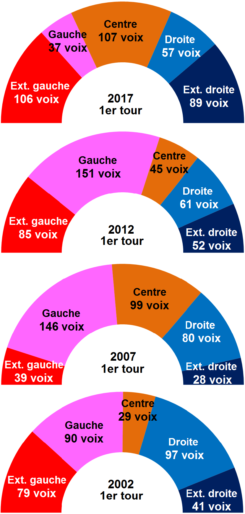 1ers tours présidentielles Avezac-Prat-Lahitte